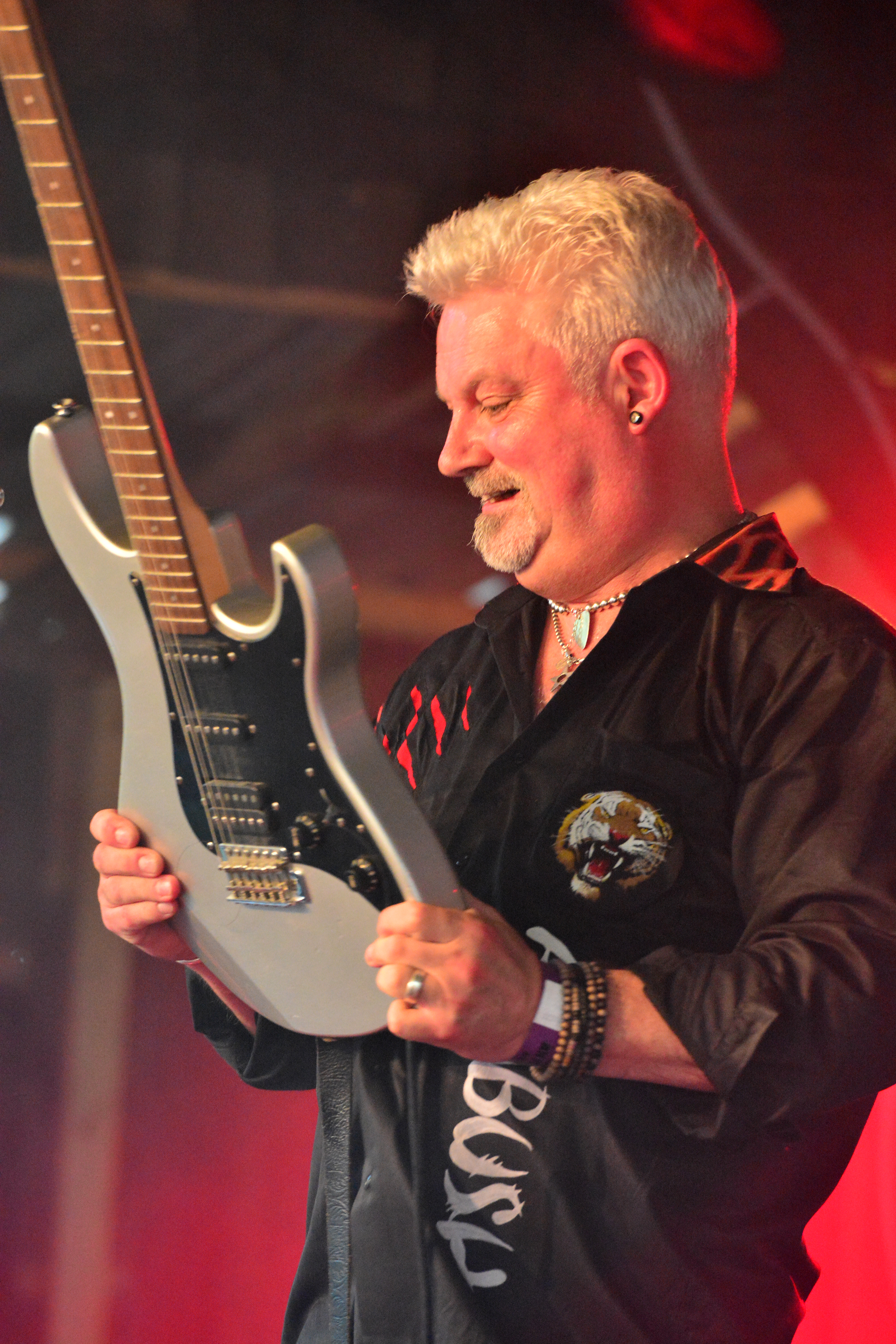 Robb Weir von Tygers of Pan Tang beim Headbangers Open Air 2014